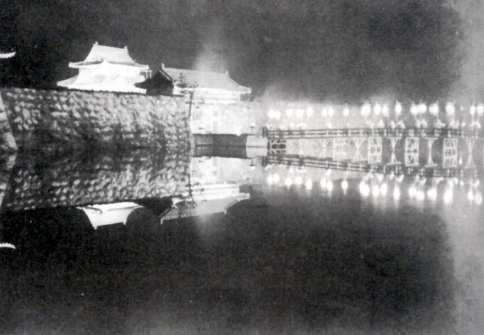 『忠魂義烈 実録忠臣蔵』（1928年）、マキノ・プロダクション御室撮影所のセット